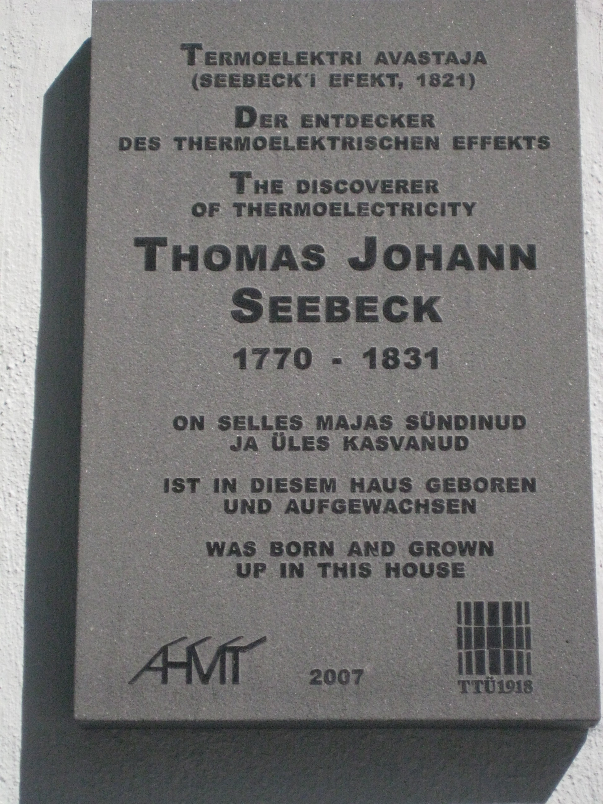 Tafel am Geburtshaus von Seebeck in Tallinn /Estland